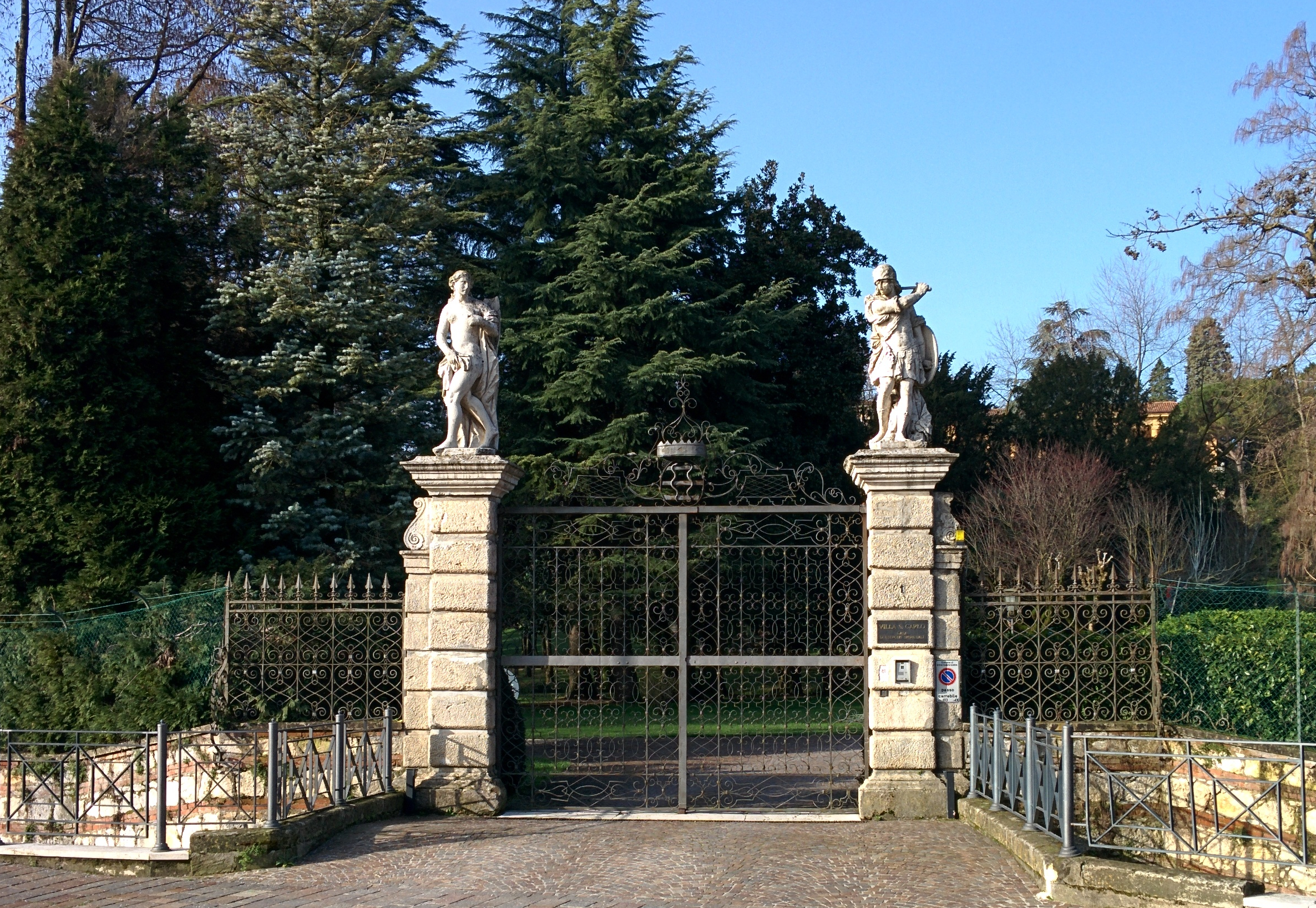 foto del cancello della Villa di San Carlo